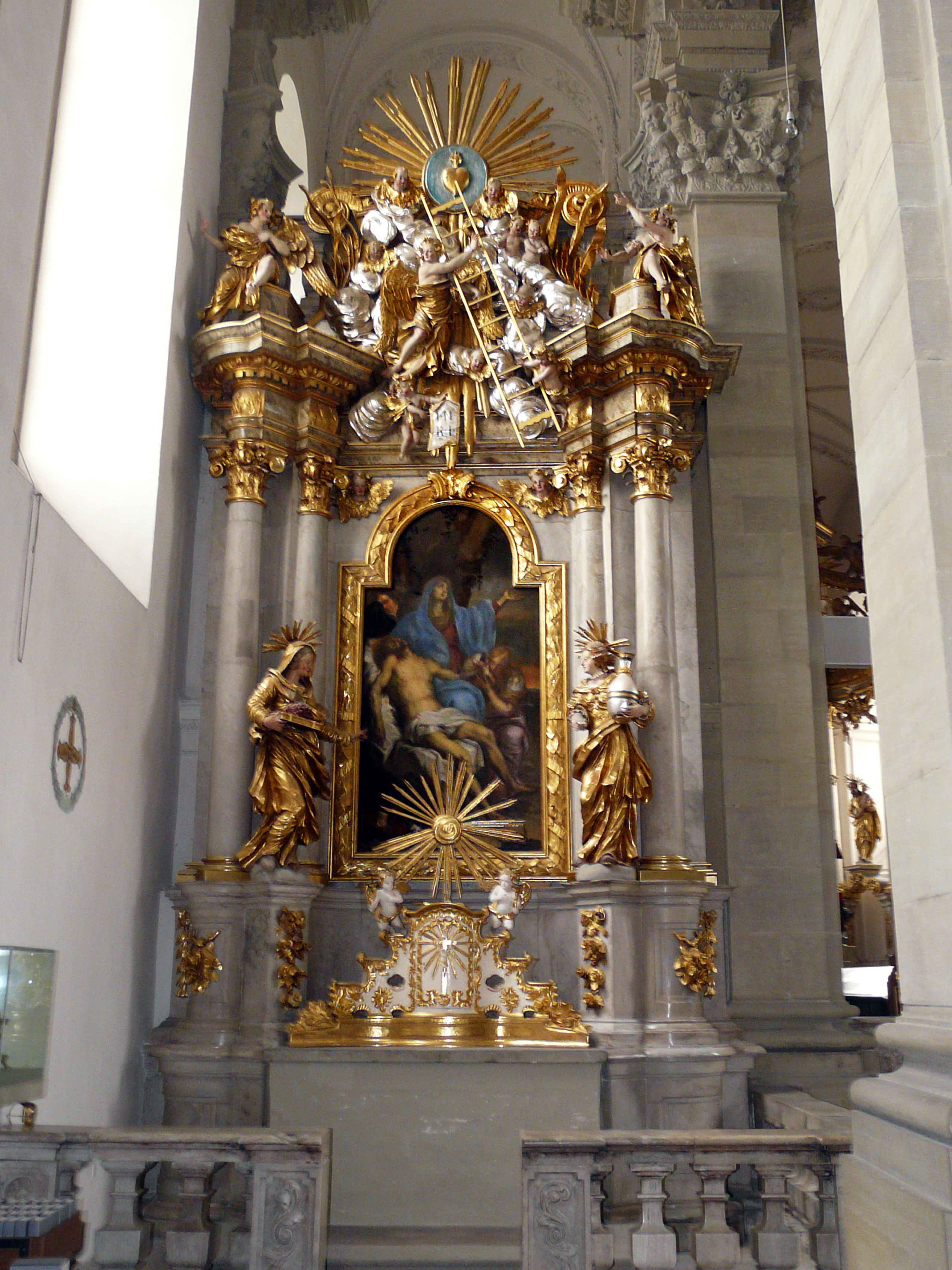 Северный алтарь